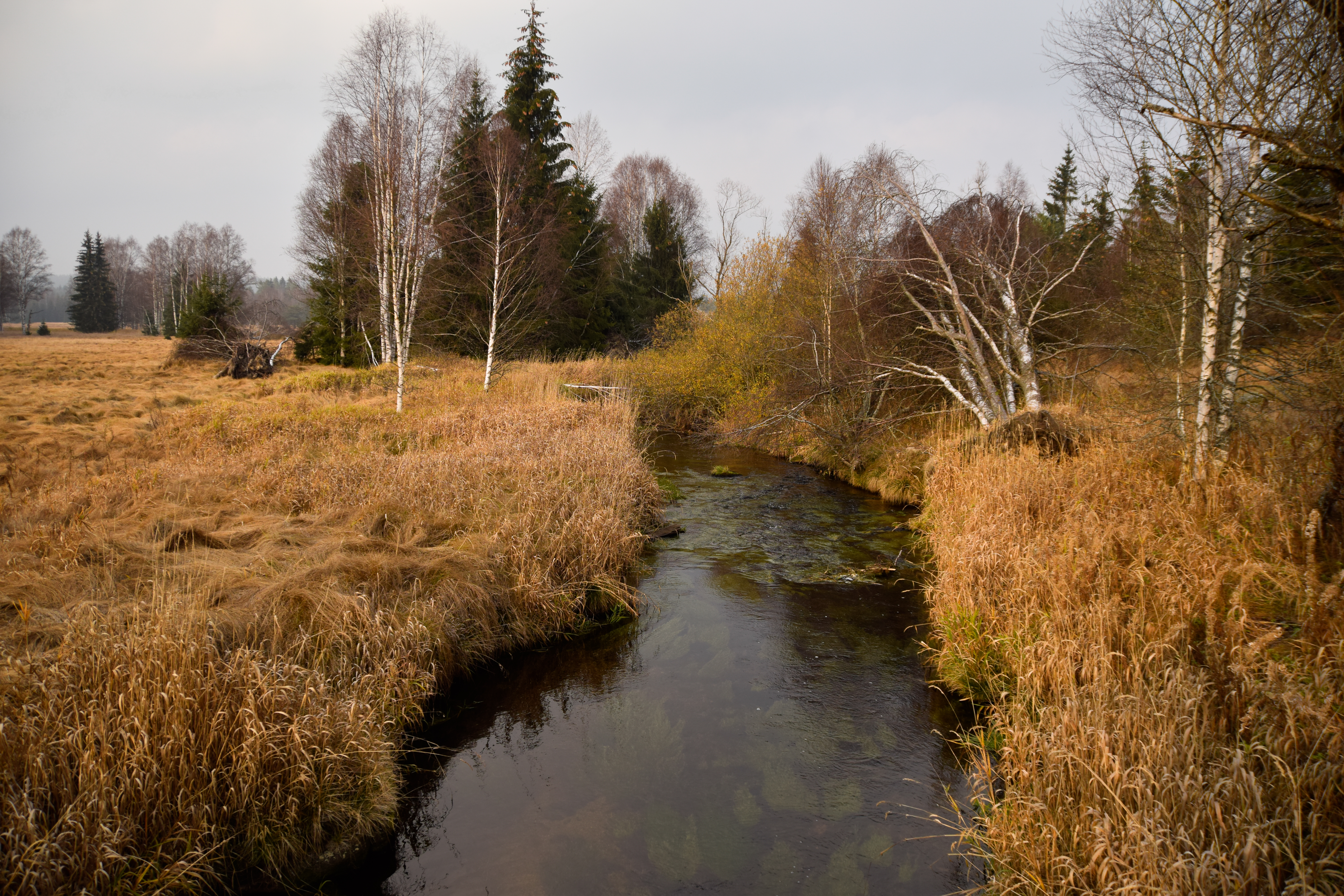 Die Bergmoorwiesen Spálený luh entlang der Kalten Moldau in der Nähe von Nové Údolí.